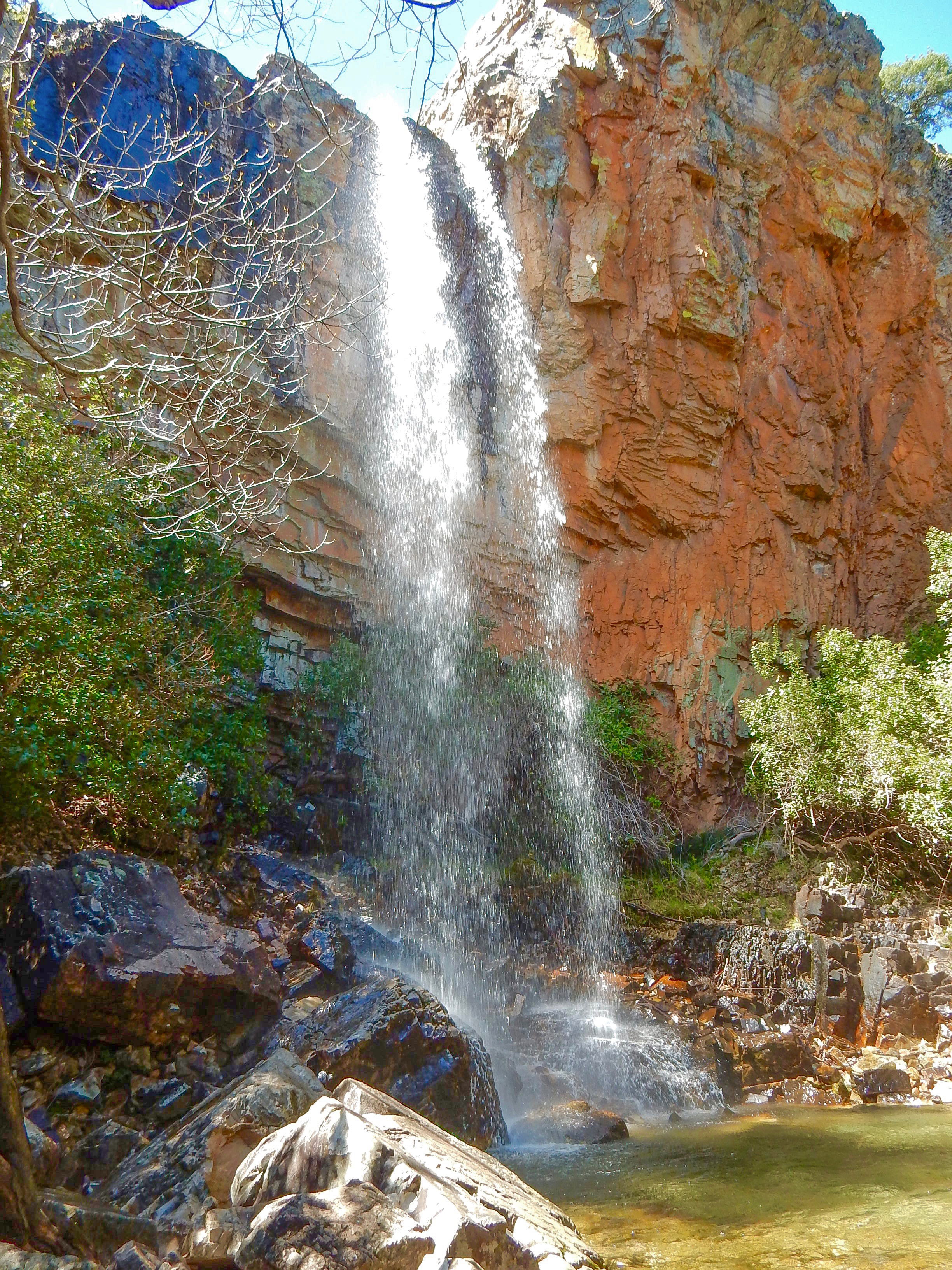 Las cascada principal de las Batuecas.